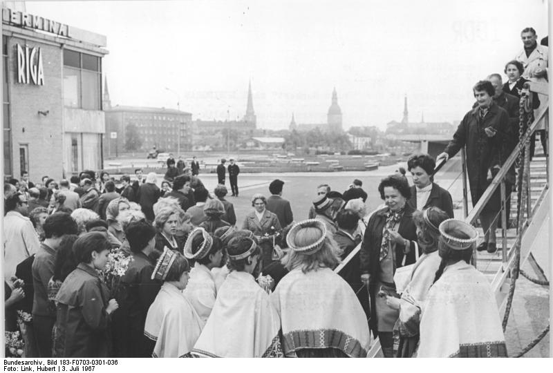 Zentralbild Link 3.7.1967 Urlaubsreisen mit der "Fritz Heckert" nach Leningrad. 368 Bürger der Deutschen Demokratischen Republik - von der Hausfrau, der Geflügelzüchterin, dem Neuerer, der Ärztin bis zum Vorsitzenden einer Landwirtschaftlichen Produktionsgenossenschaft - unternahmen im Jahr des Roten Oktober (50. Jahrestag der Oktoberrevolution) eine 13tätige Urlaubsreise des Freien Deutschen Gewerkschaftsbundes mit dem Turbinenmotorschiff "Fritz Heckert" nach Leningrad, der Wiege der sozialistischen Revolution. Im zweiten Weltkrieg erlebte Leningrad durch die 900 Tage dauernde Belagerung der Faschisten (1942-44) die Schwersten Jahre seiner Geschichte. Aus Ruinen wieder auferstanden ist die Newastadt heute Anziehungspunkt für Touristen aus aller Welt. Erholsame aber auch abwechslungsreiche Stunden an Bord und erlebnisreiche Tage in den Städten Gdynia, Sopot, Gdansk und Riga werden den Urlaubern in unvergeßlicher Erinnerung bleiben. Herzlich begrüßt wurden von Schülern einer Rigaer Mittelschule die DDR-Urlauber bei ihrer Ankunft am Passagierkai von Riga, der Hauptstadt der Lettischen SSR.